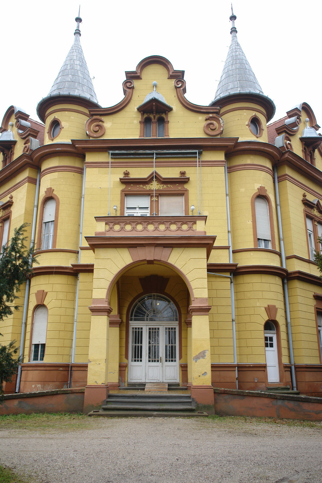 v. Pallavicini-kastély, Tüdőszanatórium (Mosdós, Petőfi S. u. 4 .) This is a photo of a monument in Hungary. Identifier: 8015